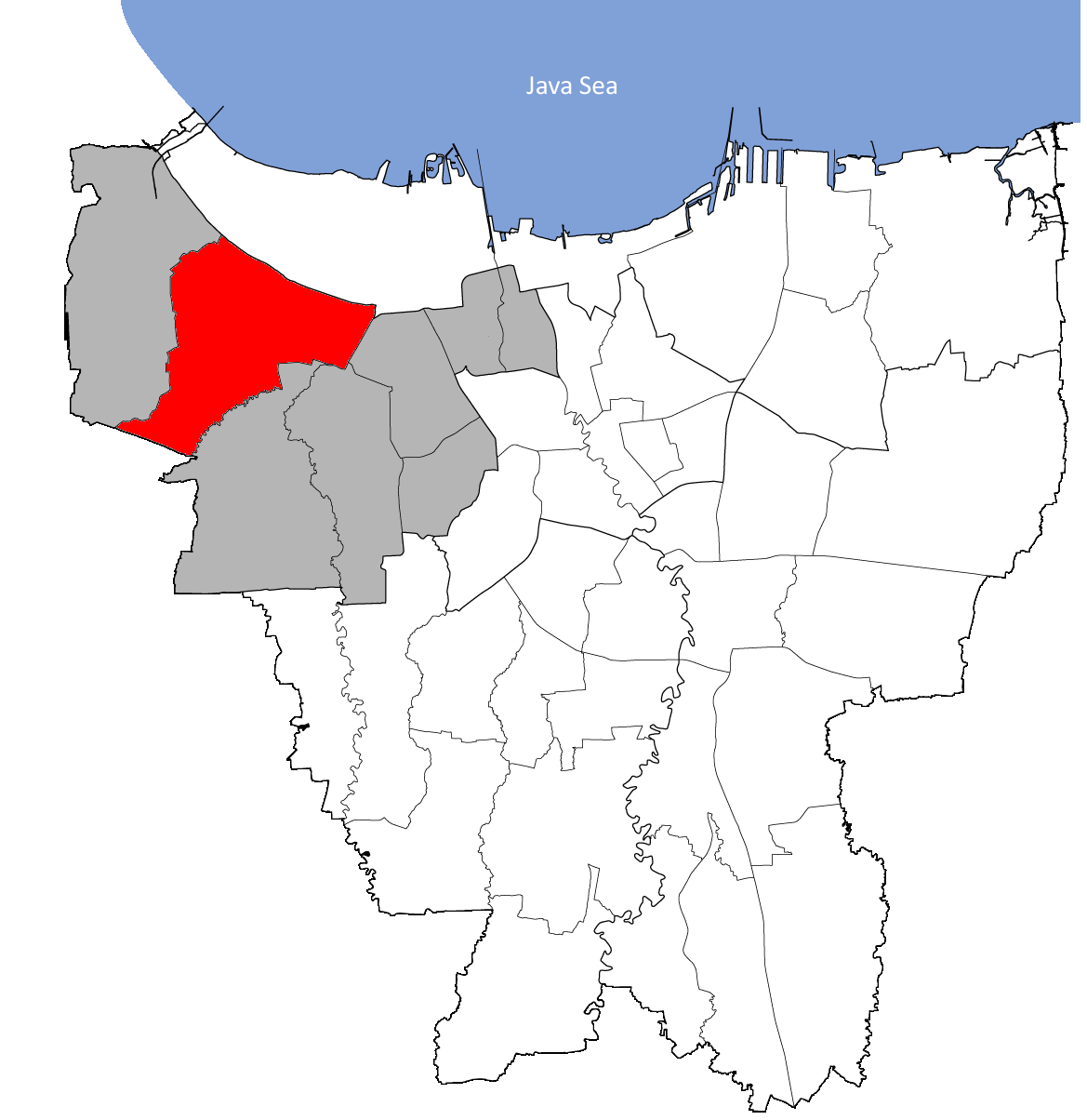 Cengkareng;onderdistrict (Kecamatan) van West-Jakarta